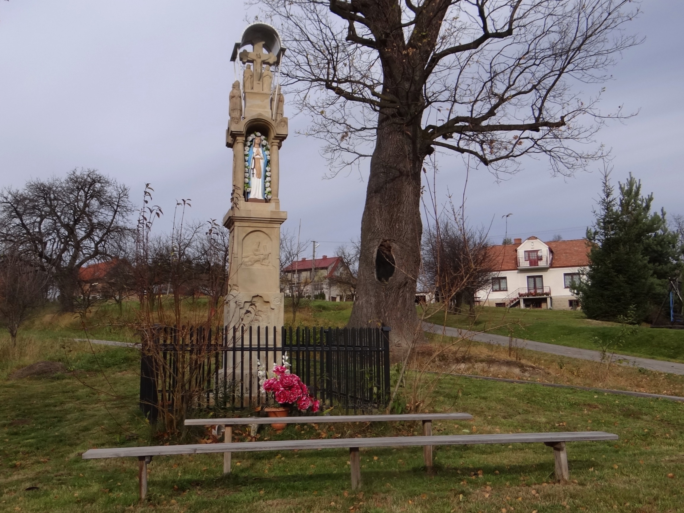 Bytomsko. Figurka przydrożna